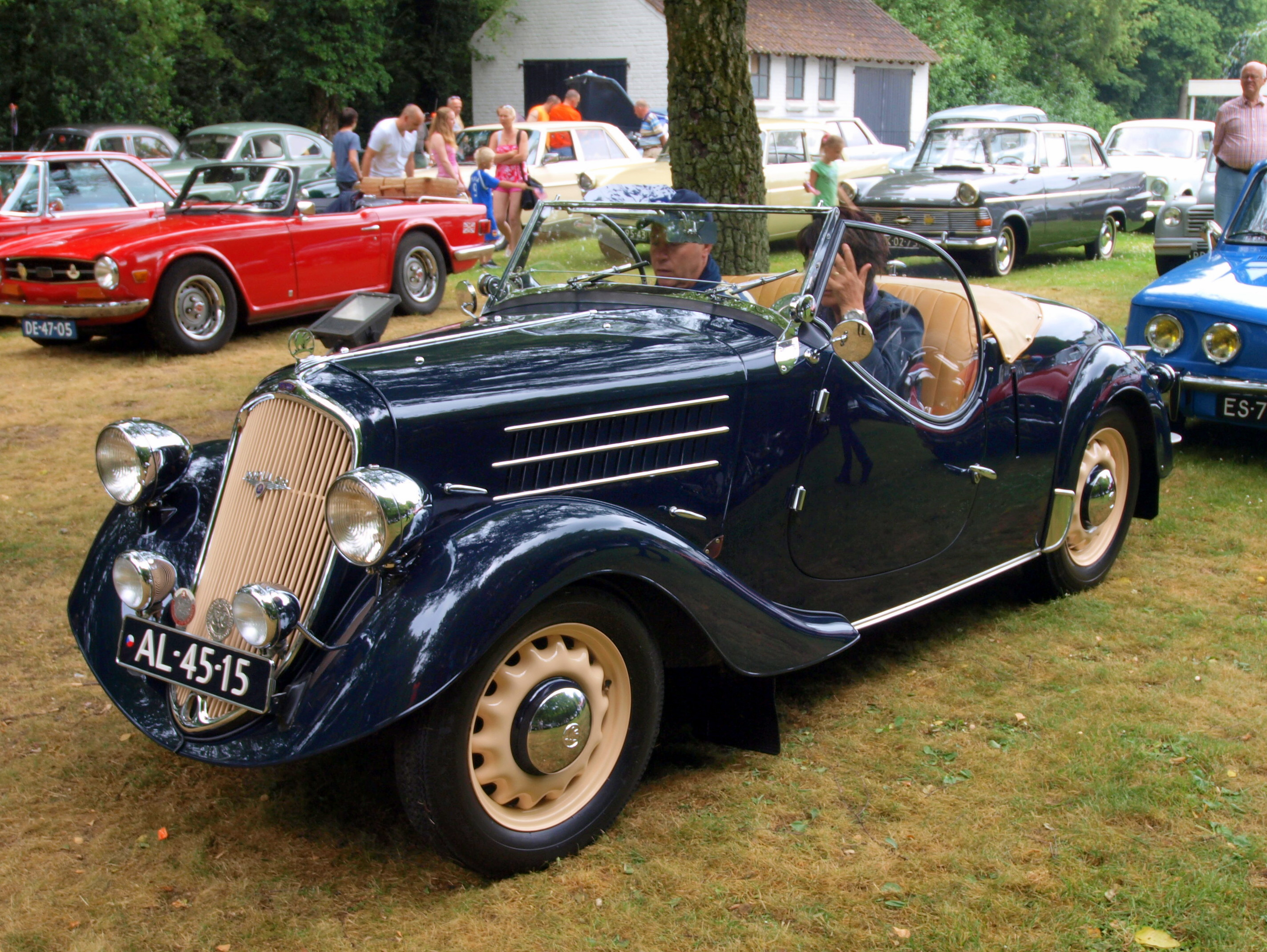 SKODA Popular II (1937)